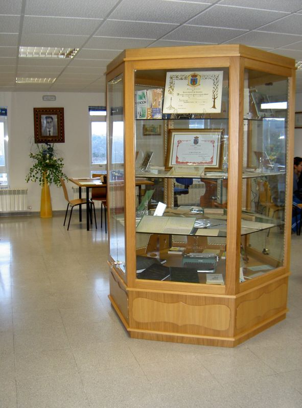 Biblioteca del Centro Socio-cultural Manuel Rodriguez Lopez